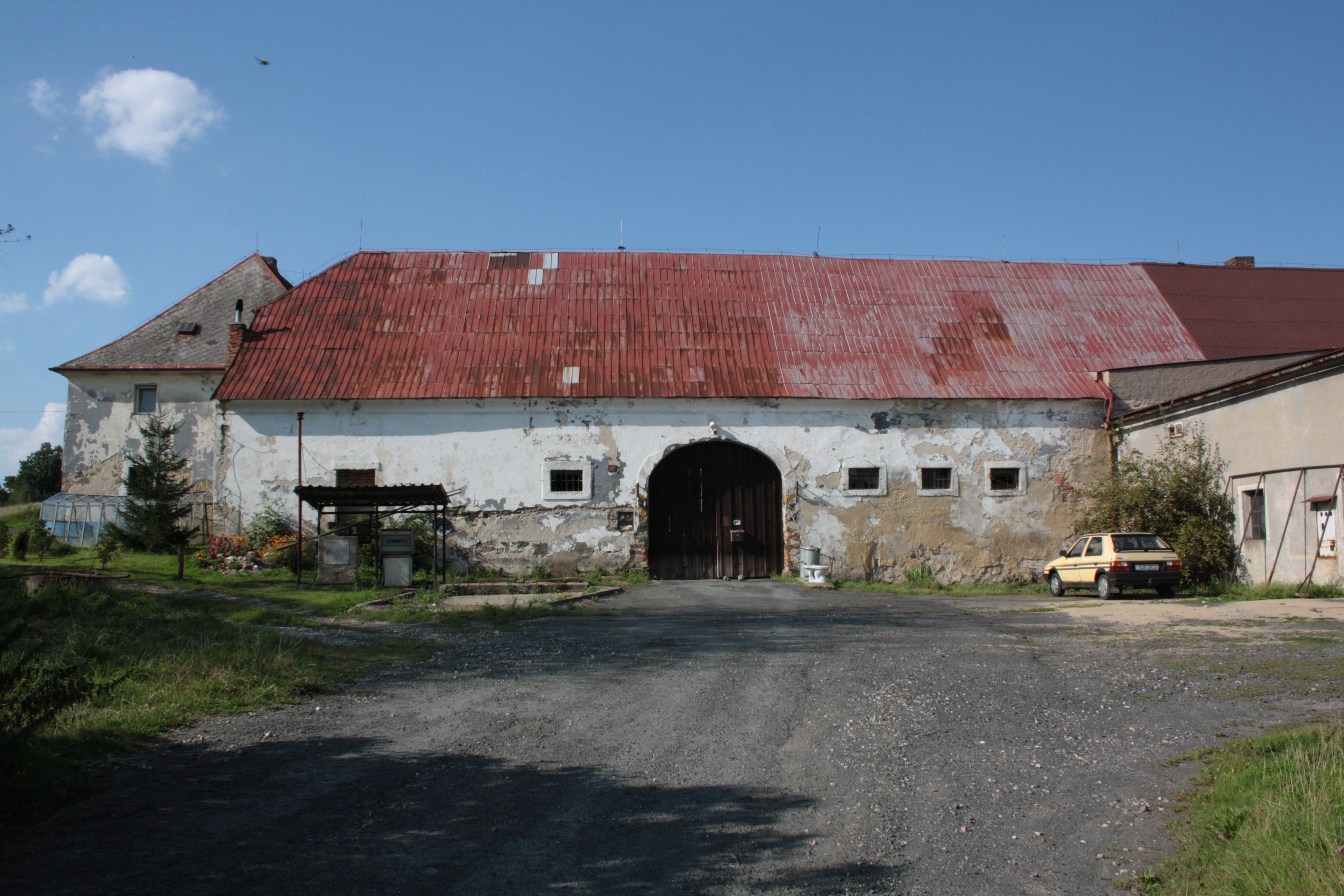 This photograph was taken with a DSLR from WMCZ's Camera grant. Dům evidenční číslo 9 v Dolních Pertolticích.